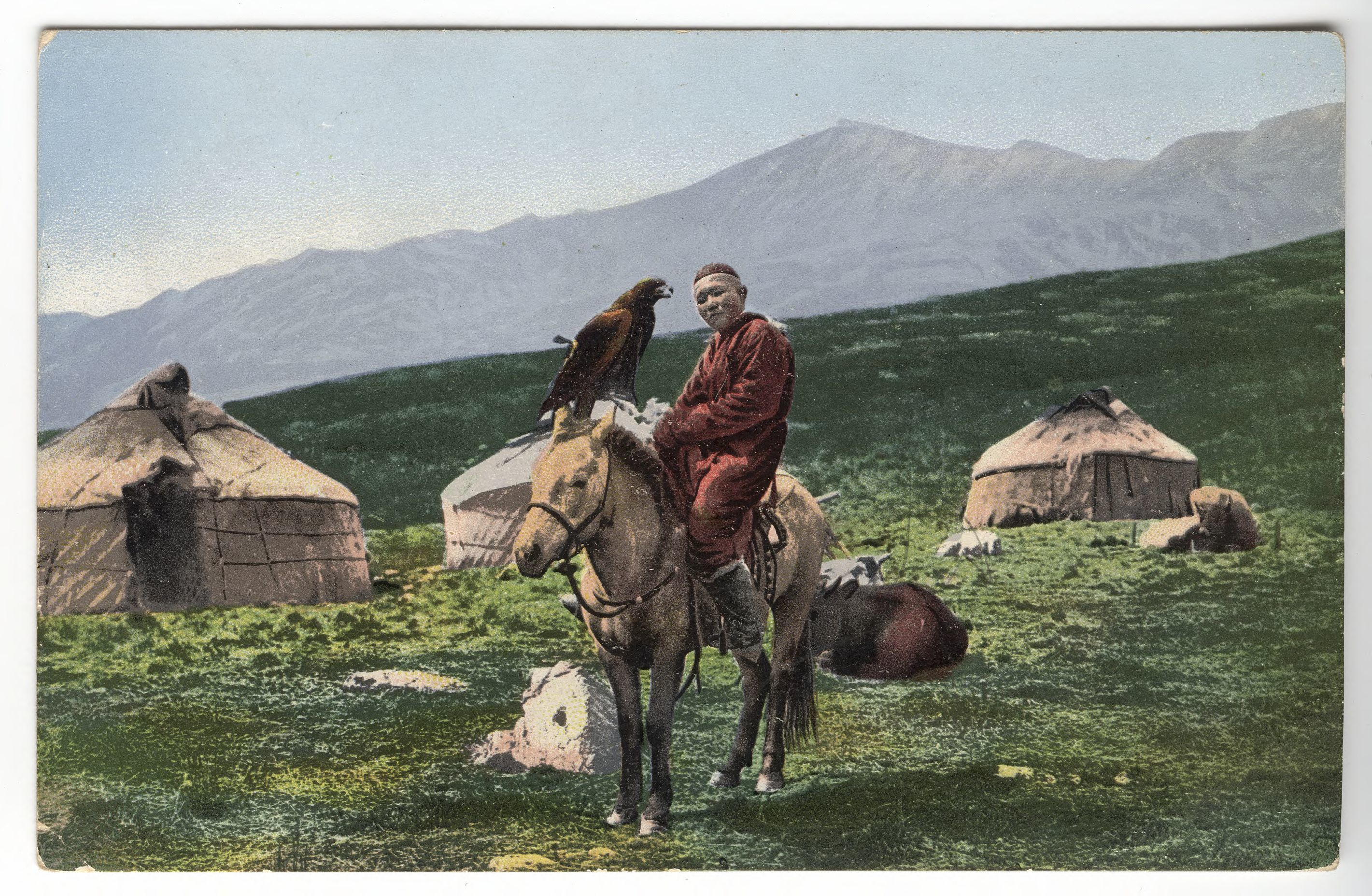 Казах на лошади с беркутом на фоне юрт. Долина реки Аракан, притока Черной Берели